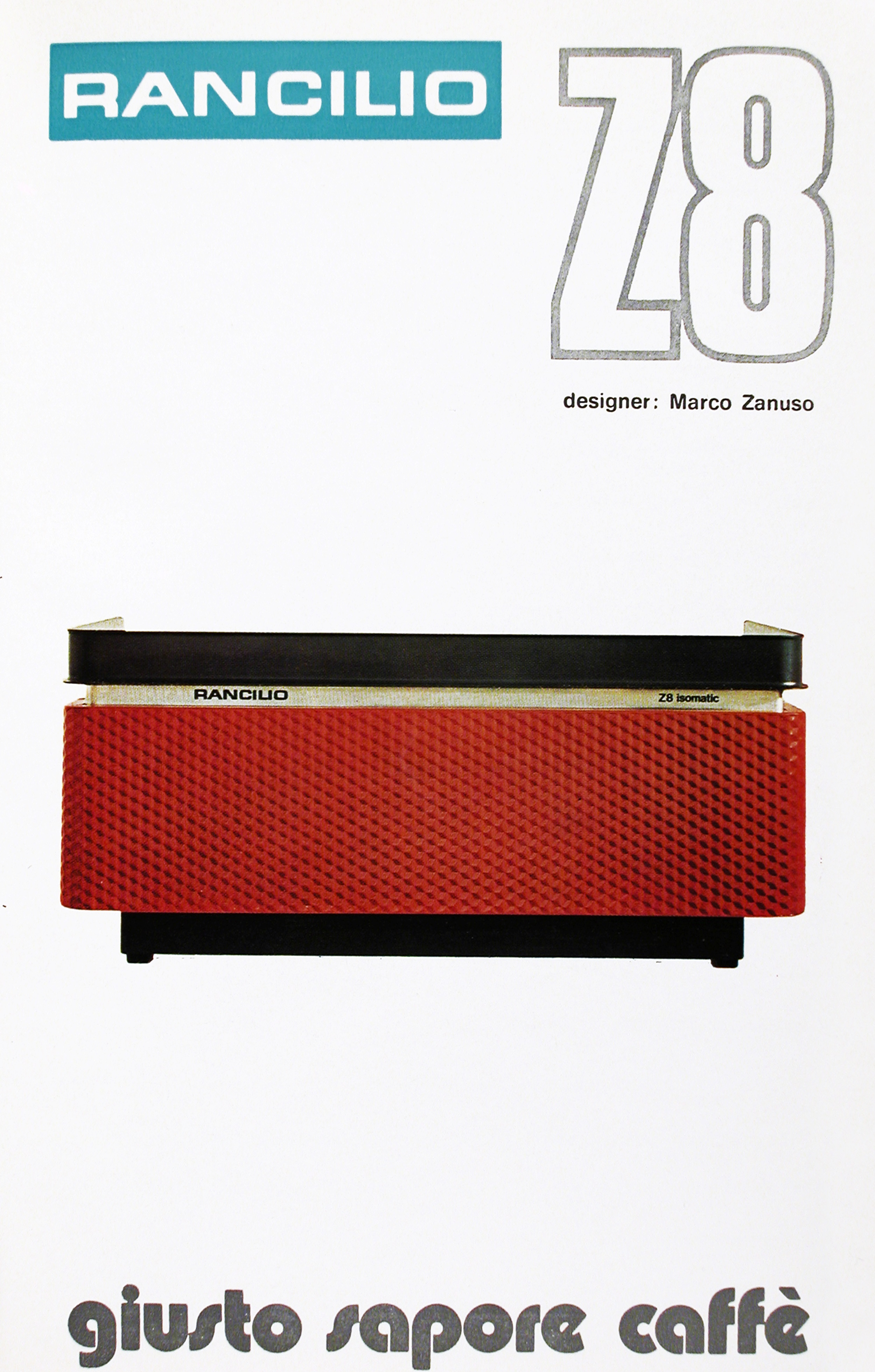 Un esempio di ADV dedicata alla nuova Rancilio Z8